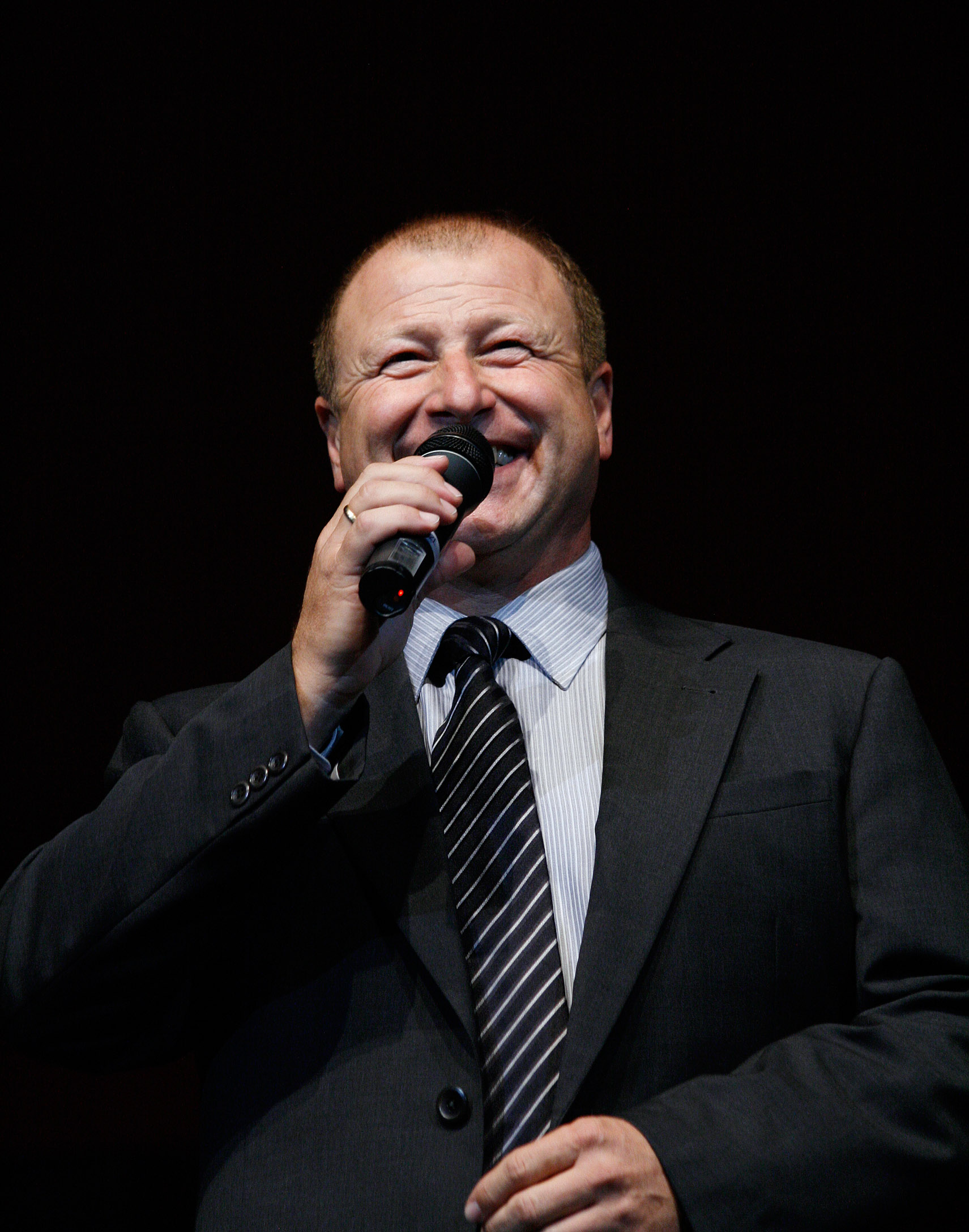 Harald Prünster beim 2. Jubiläumsfest der Volksmusik Superstars in der Wiener Stadthalle.